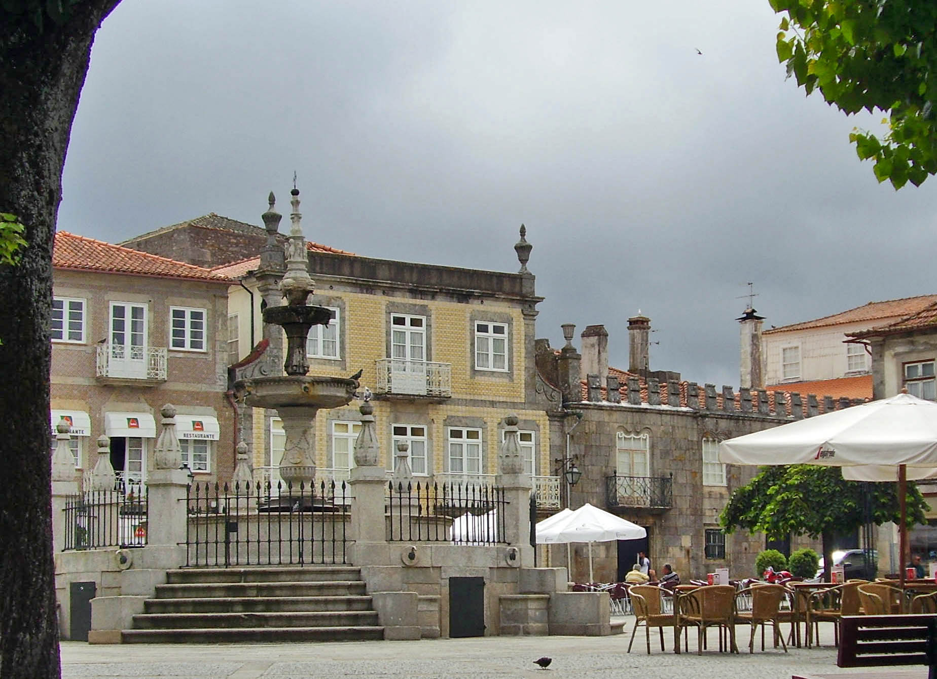 Centro histórico de Caminha This file was uploaded for Wiki Loves Monuments in Portugal with the unique identifier 342024.